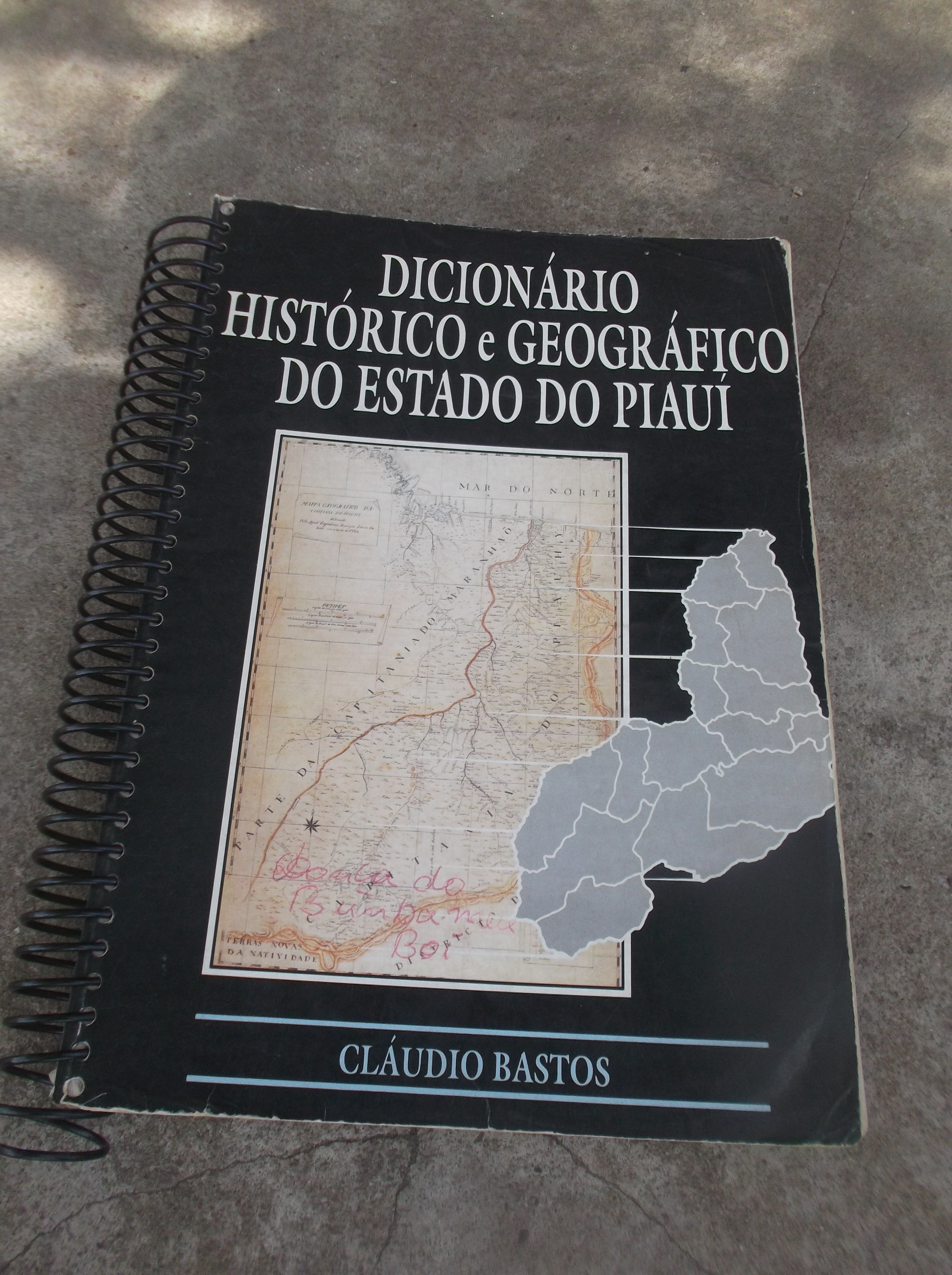 Imagem do Dicionário Histórico e Geográfico do Piauí (edição da Prefeitura de Teresina) em 1994.